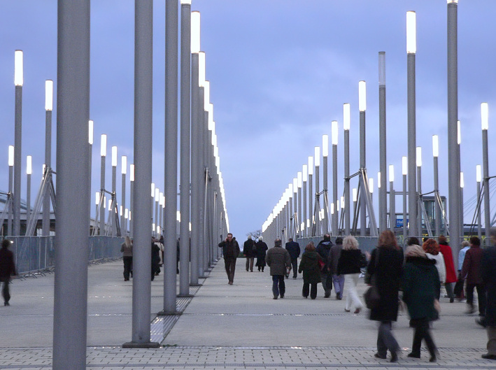 Exponale-Fußgängerbrücke EXPO-Gelände Hannover Foto aufgenommen von Benutzer Benutzer:AxelHH, Januar 2007